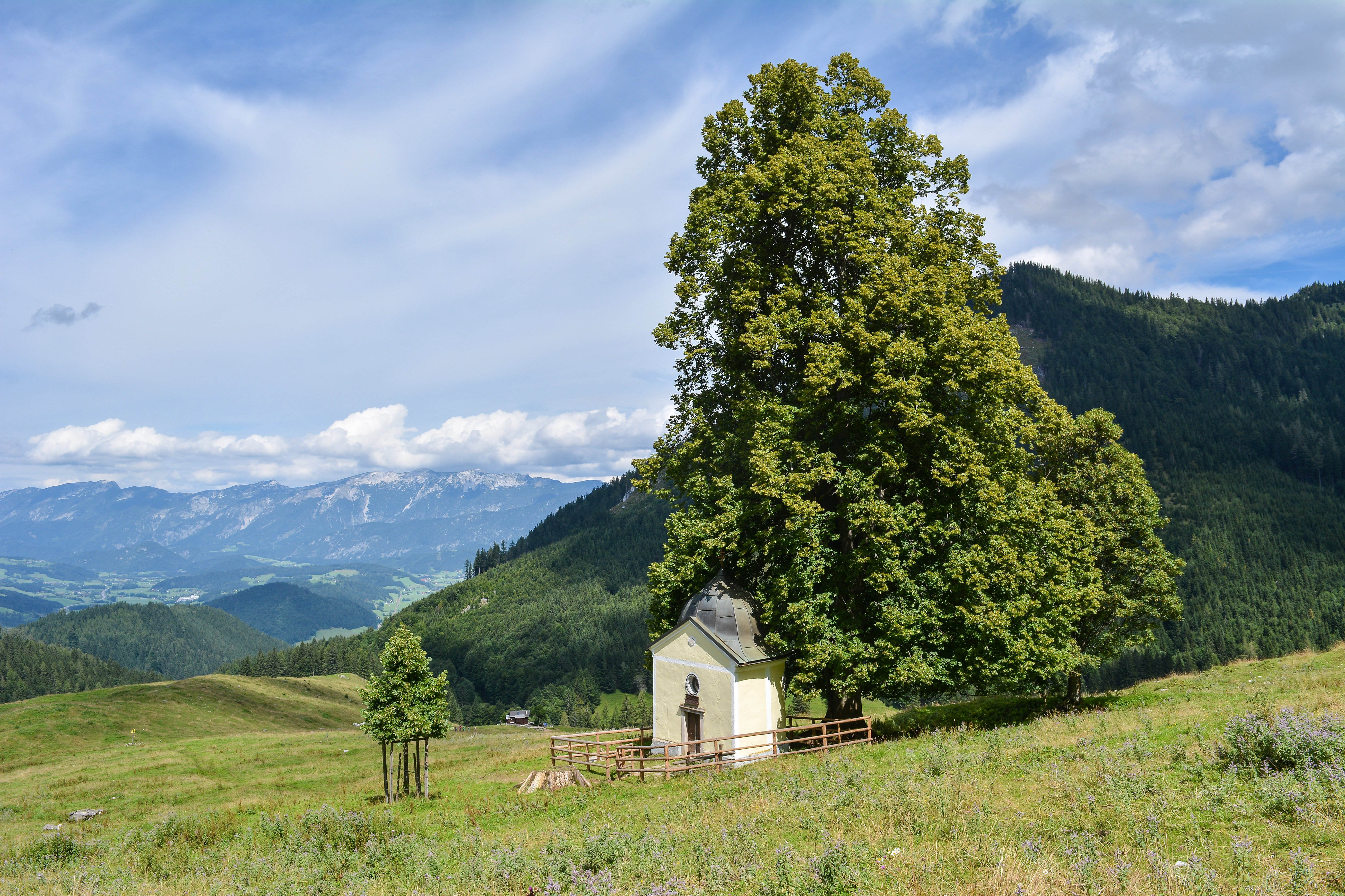 Die Ochsenwald-Kapelle steht unterhalb des Arlingsattels am Wallfahrtsweg von Windischgarsten nach Frauenberg.